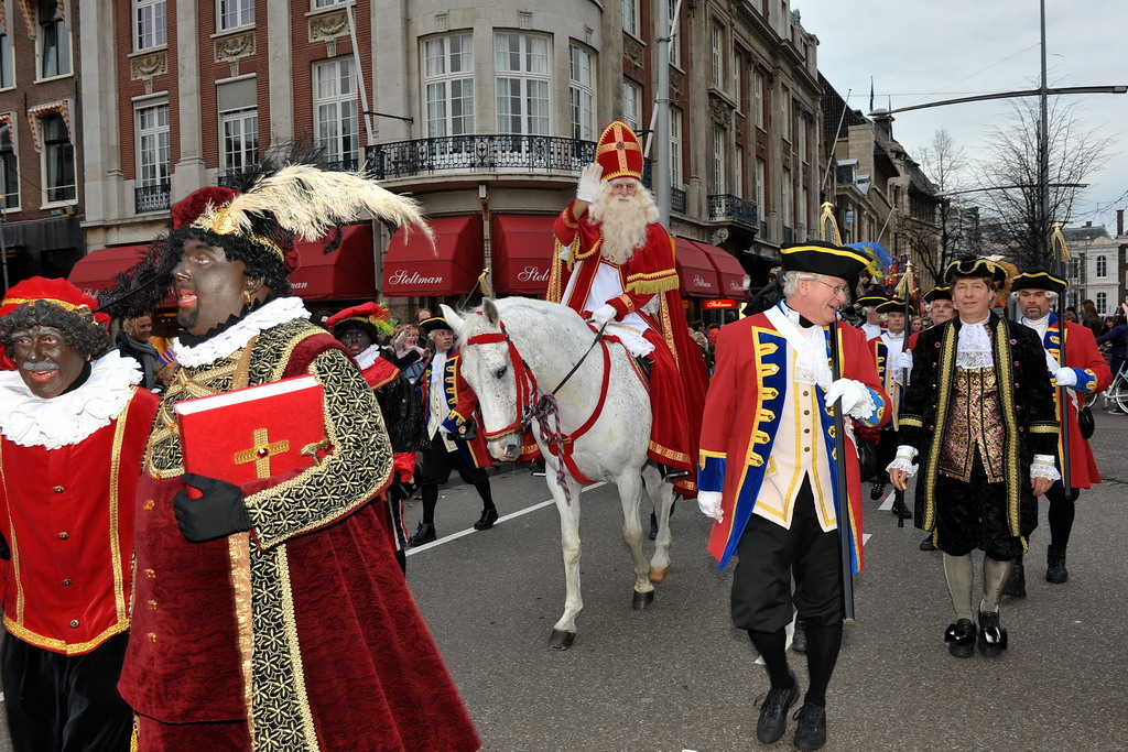 Intocht